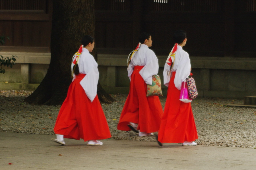 Mikos im Meji-Schrein